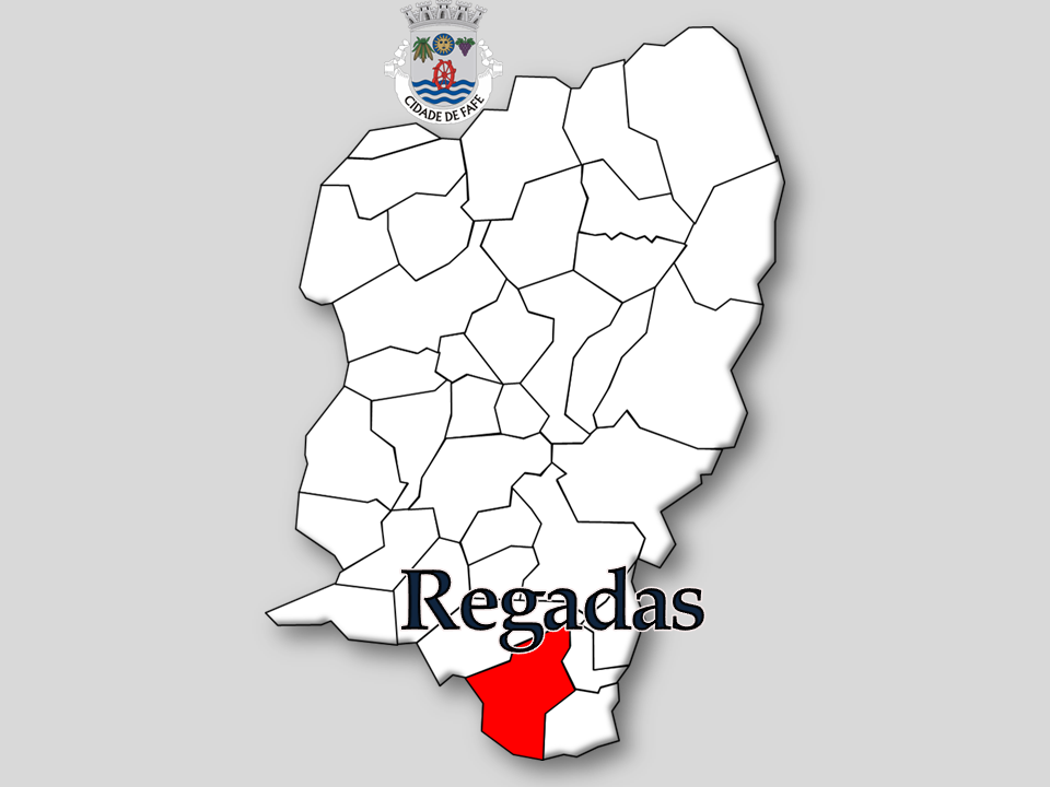 Censos 1864/2011